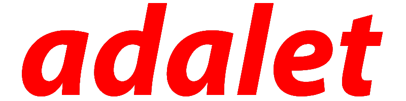 Adalet Yürüyüşü logosu